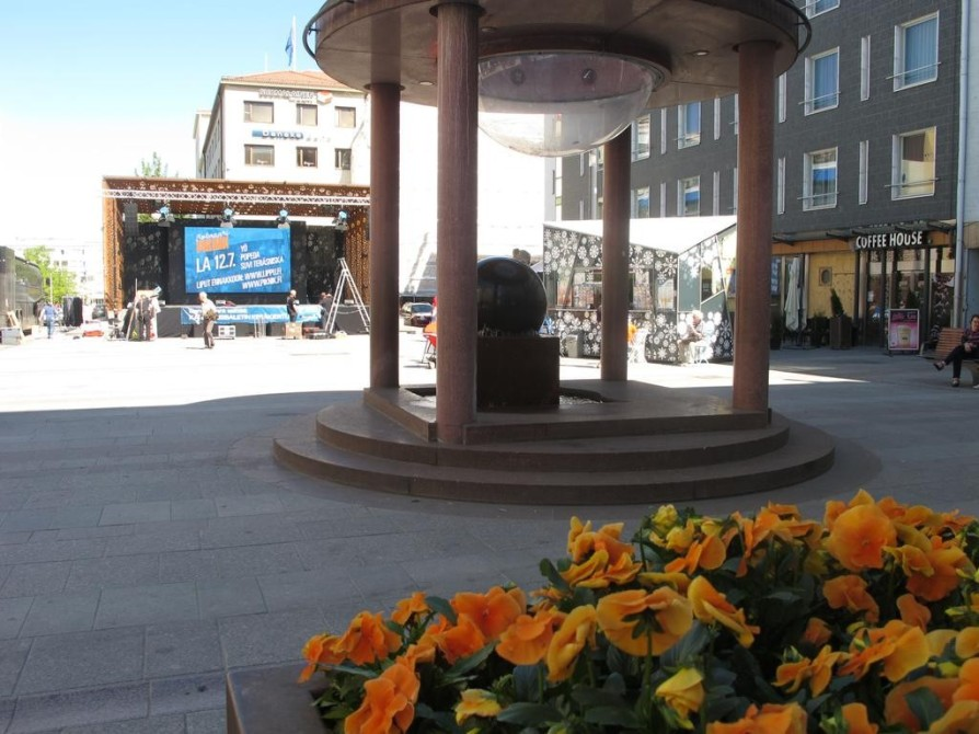 Rotuaarin aukio uudistettuna Oulun keskustassa